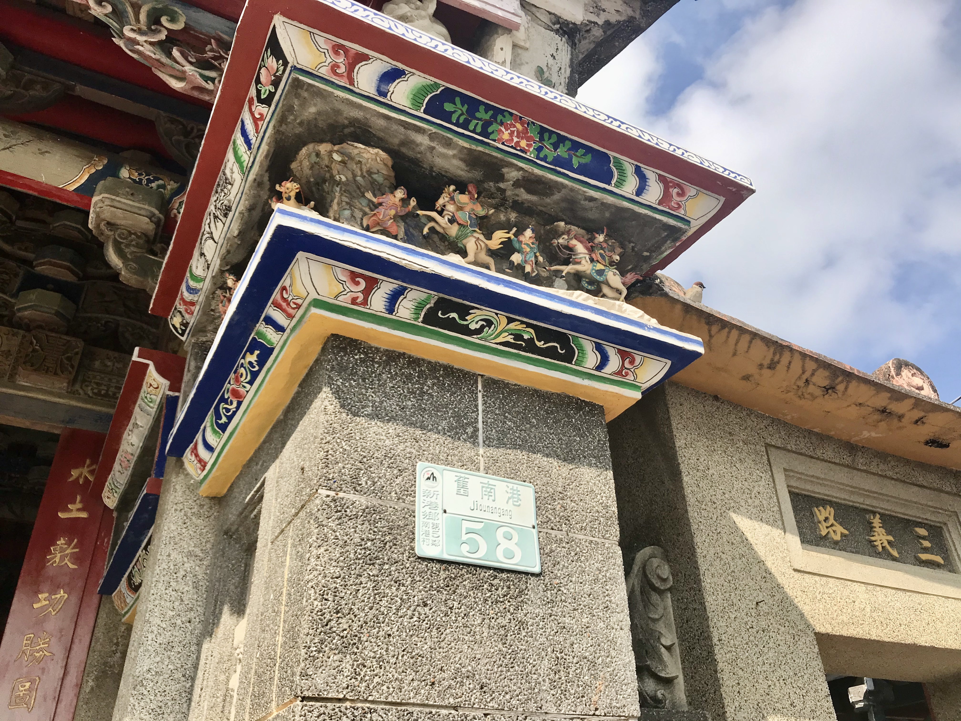 笨港水仙宮門牌